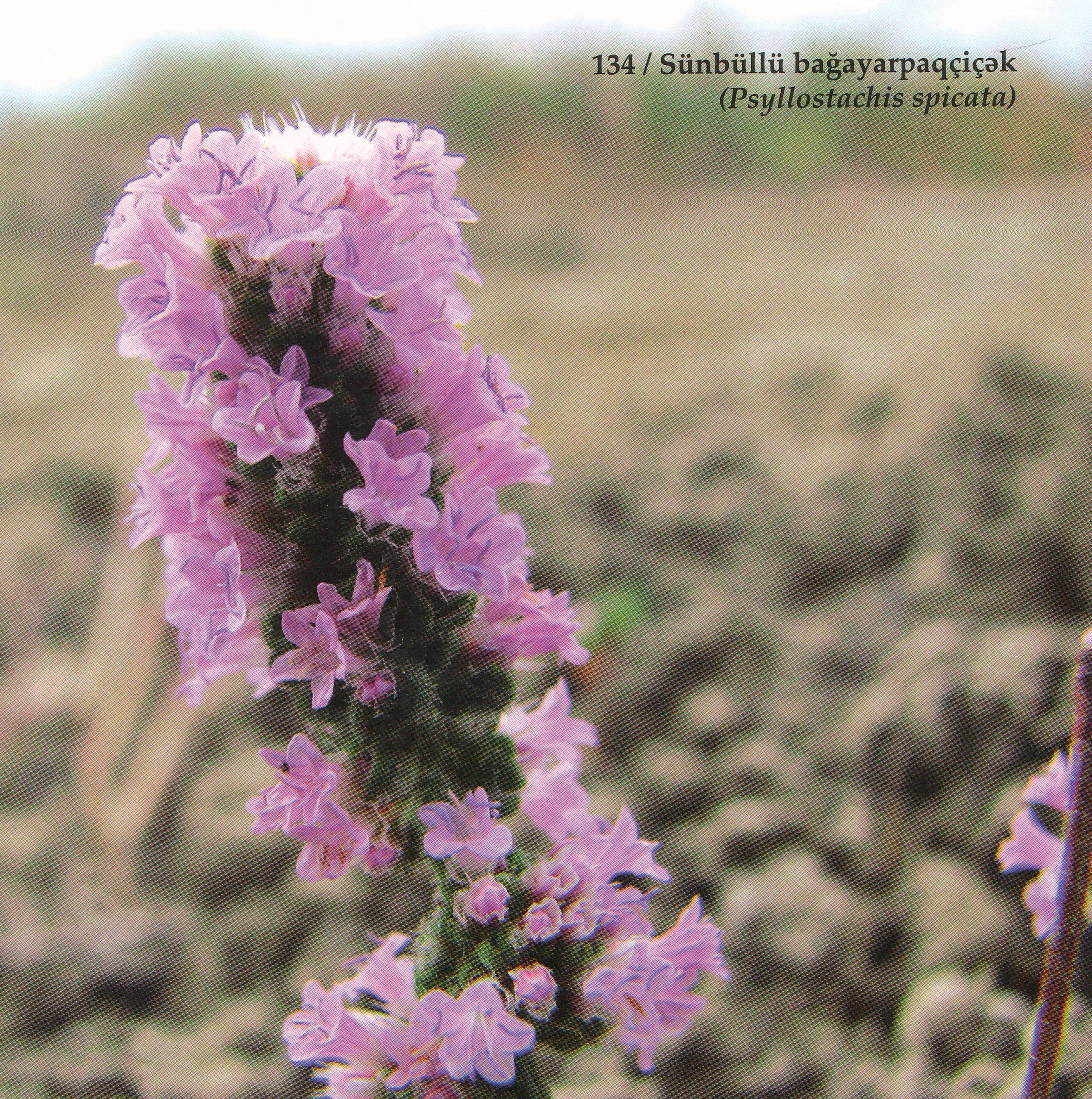 Salyan Sünbüllü bağayarpaqçiçək